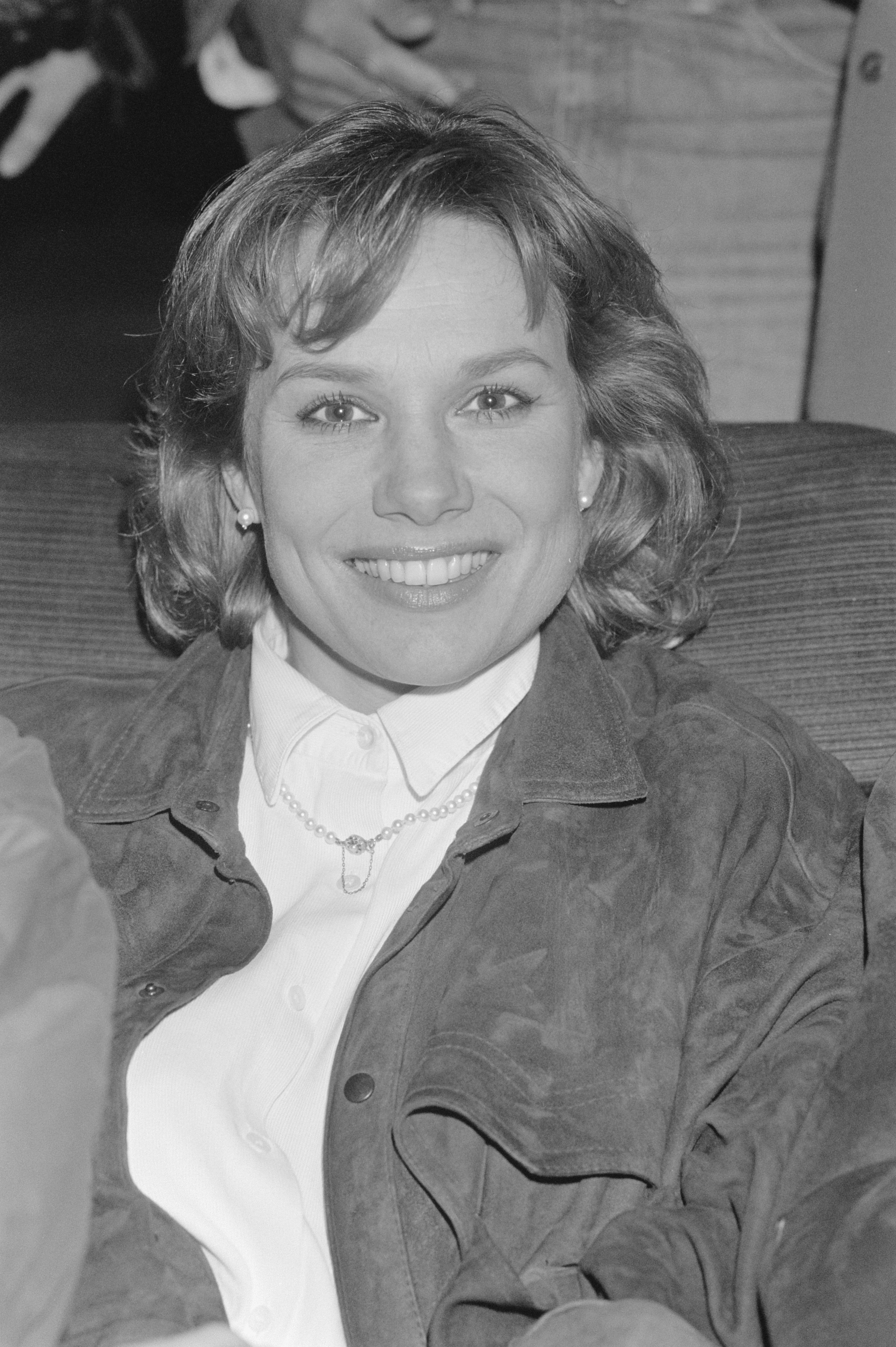 Collectie / Archief : Fotocollectie Anefo Reportage / Serie : [ onbekend ] Beschrijving : Perspremiere Nederlandse film "Amsterdamned"; nr. 16, 17, 18: Monique van de Ven , koppen Datum : 8 februari 1988 Trefwoorden : actrices, films Fotograaf : Croes, Rob C. / Anefo Auteursrechthebbende : Nationaal Archief Materiaalsoort : Negatief (zwart/wit) Nummer archiefinventaris : bekijk toegang 2.24.01.05 Bestanddeelnummer : 934-1858